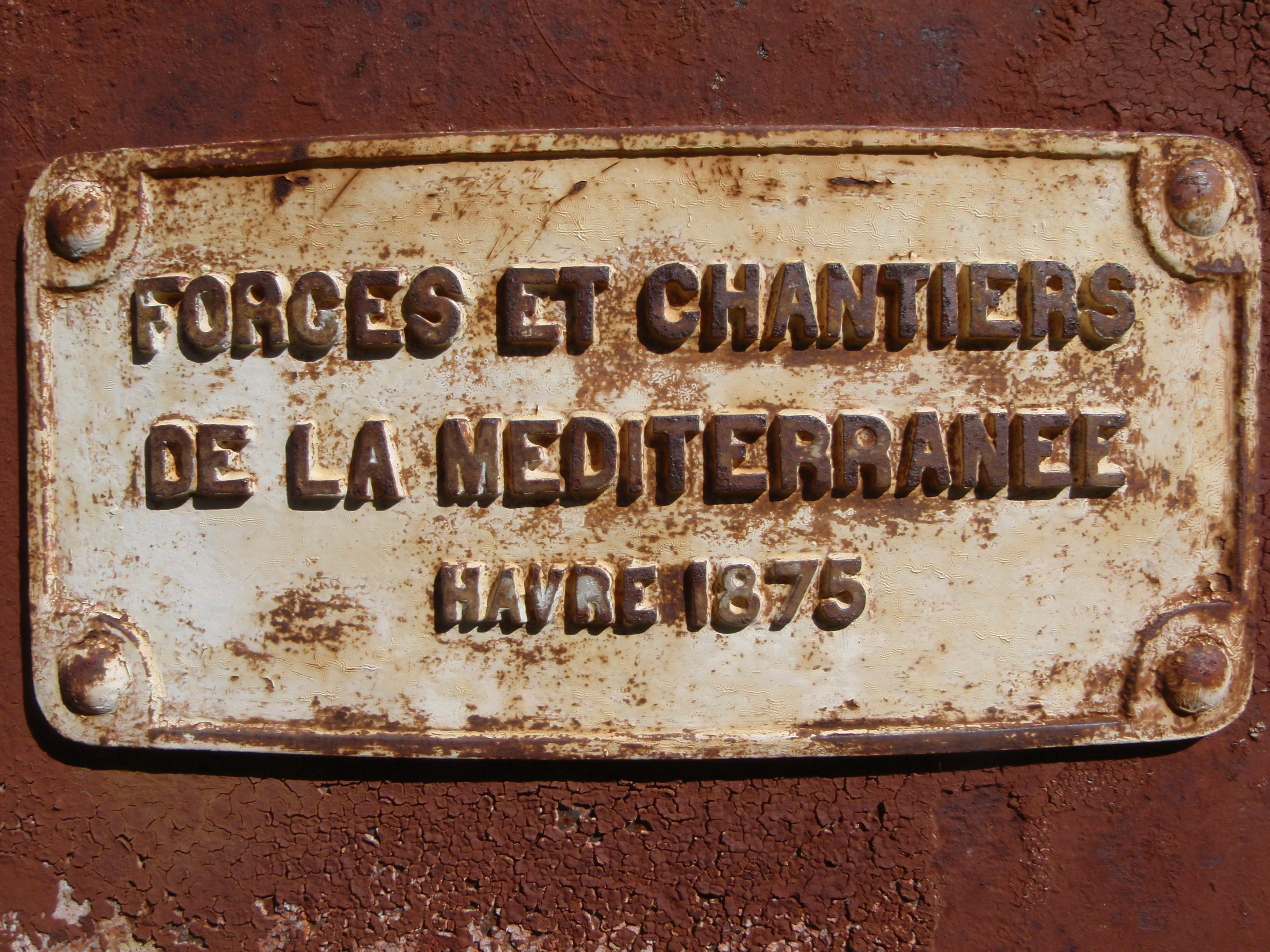 tahvel Ruhnu tuletornil, mis ehitati 1877.